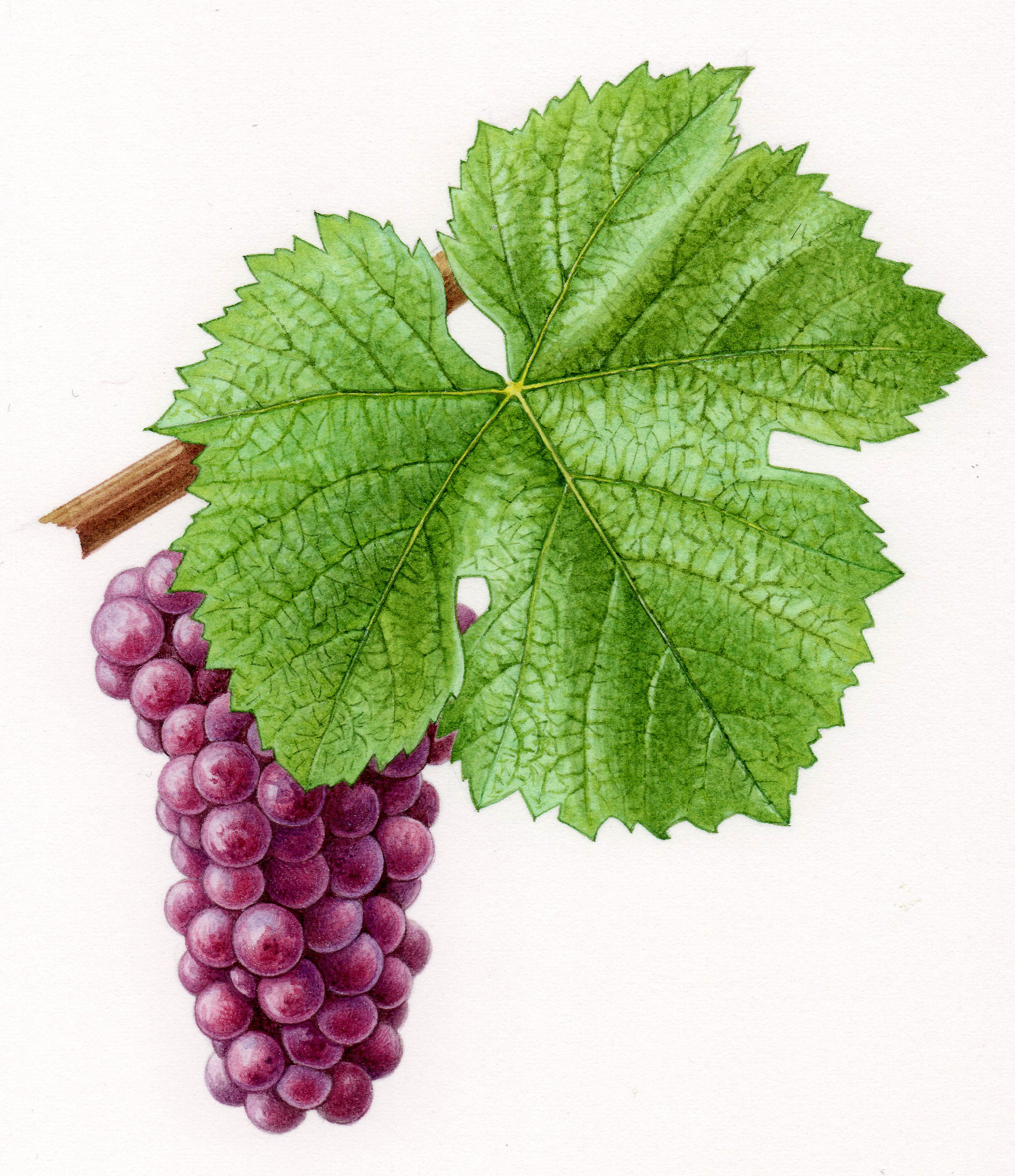 Aquarelle originale pour les Cépages de France (2001)